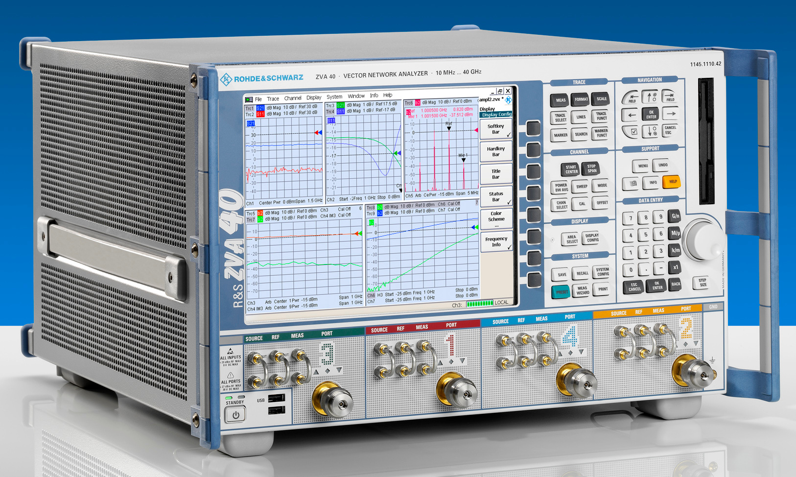 Netzwerkanalysator R&S ZVA40 der Firma Rohde & Schwarz